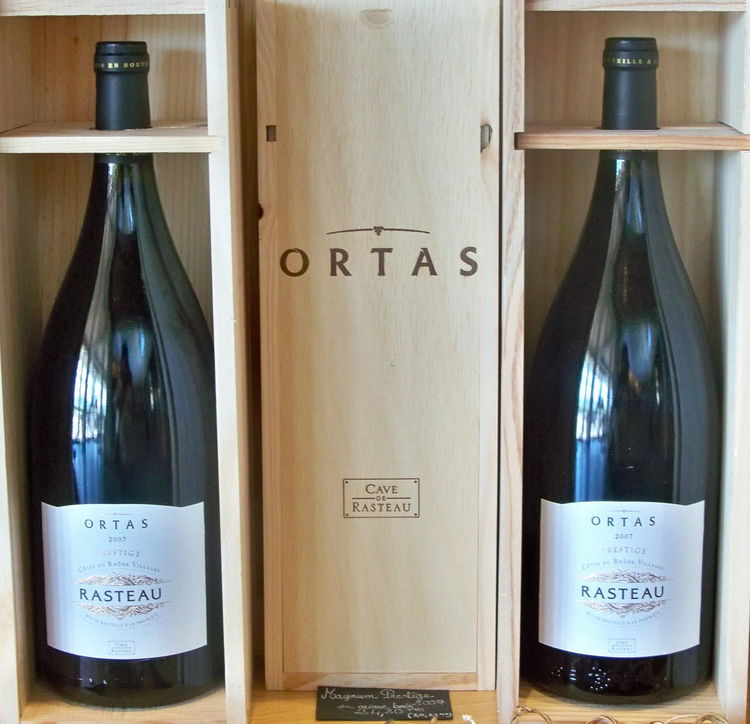 Bouteilles Magnum de Rasteau AOC, Vaucluse, France